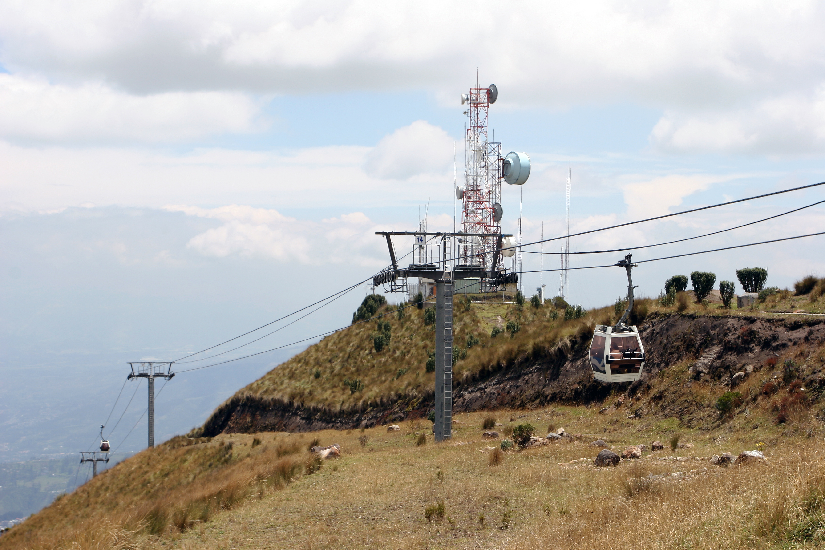 Llegada a la cumbre del teleférico de Quito (Ecuador) que asciende a la Cruz Loma muy cercana al volcán Pichincha. La altitud en este lugar es de 4050 msnm. El teleférico funciona desde el verano de 2005.